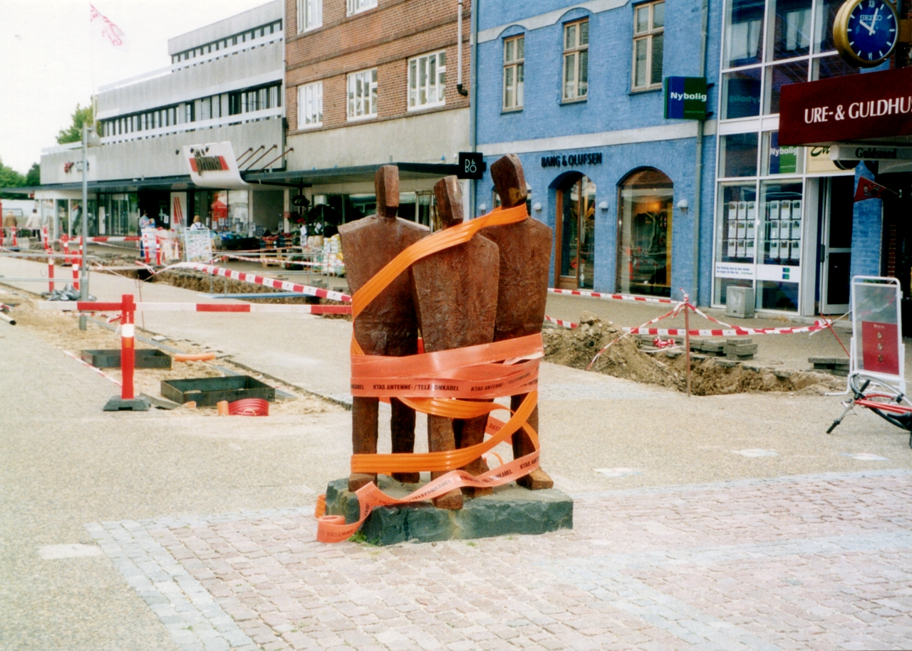 Centrumgaden, Ballerup